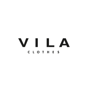 VILA logo